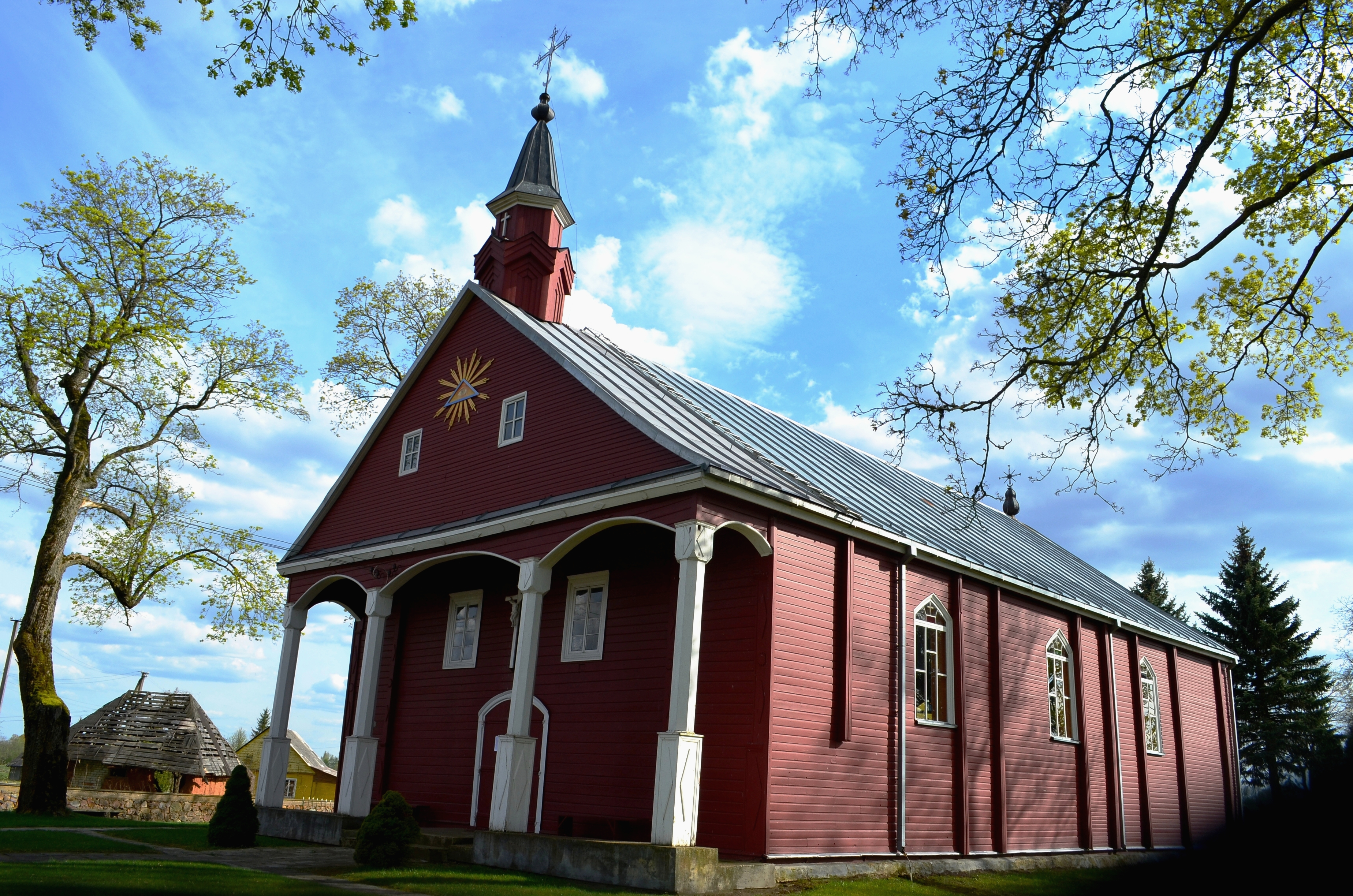 Anciškio Šv. apaštalo Mato bažnyčia, Kėdainių raj.